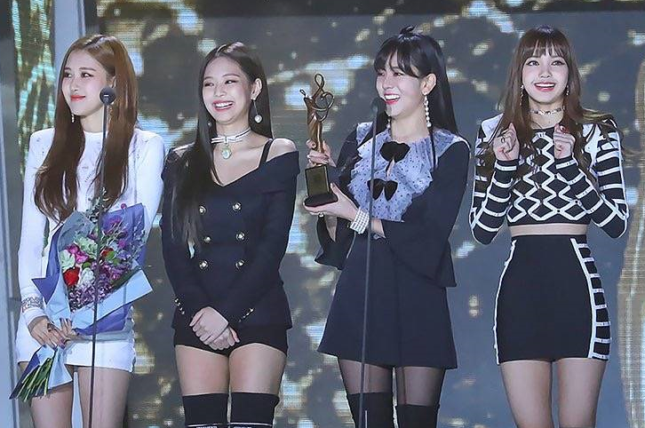 서울가요대상 - 블랙핑크